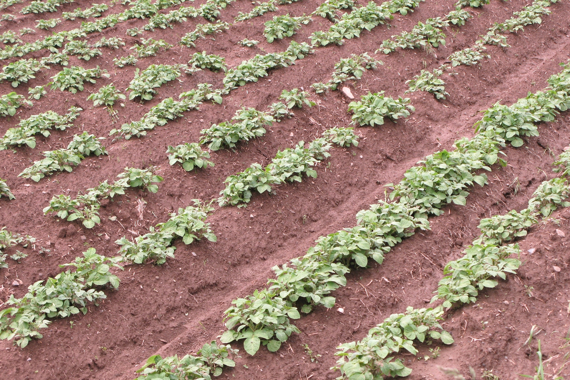 Gromperen déi um Haf stinn.